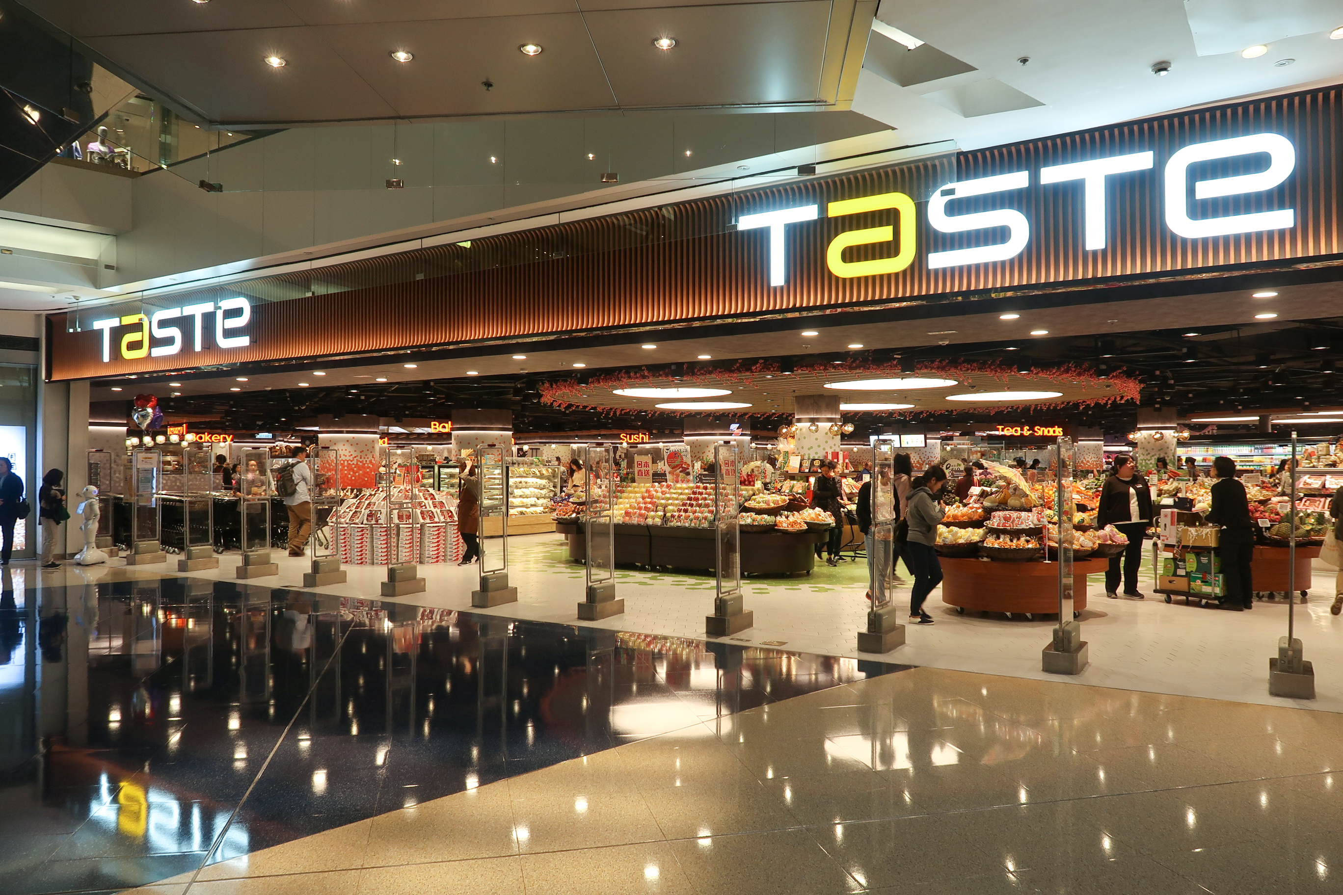 Taste Supermarket in Festival Walk